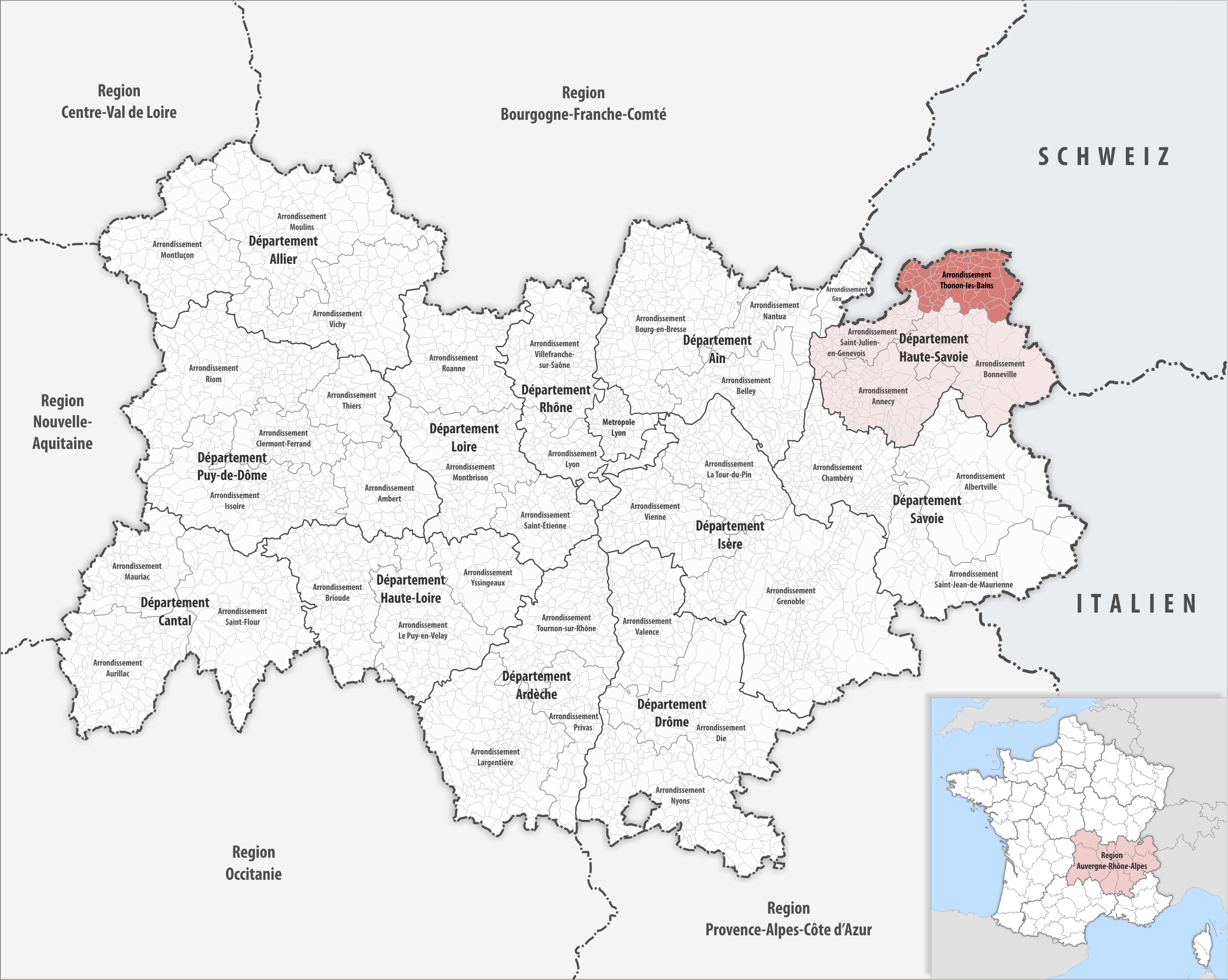 Lage des Arrondissements Thonon-les-Bains